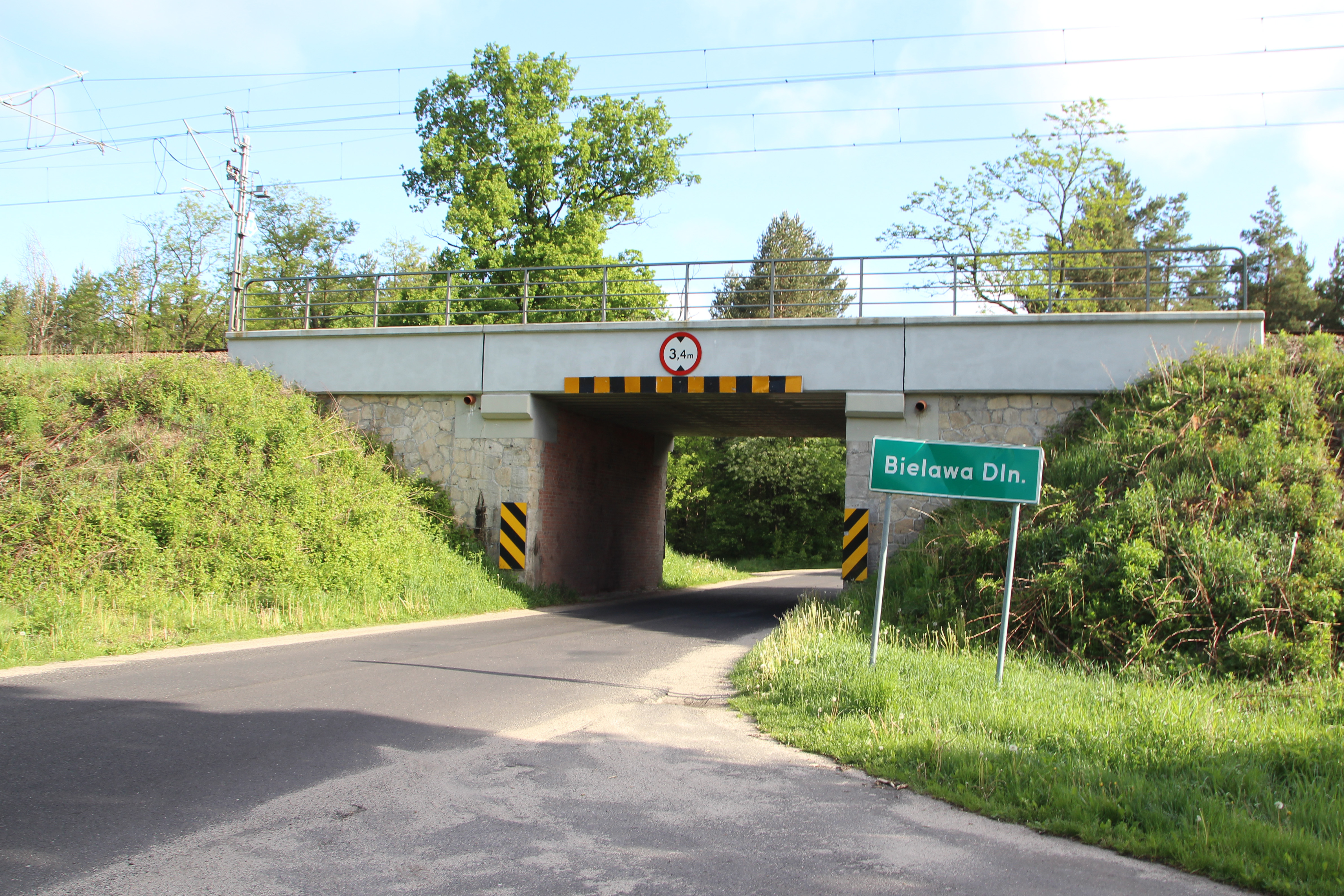 Wjazd Bielawa Dolna - wieś w Polsce w województwie dolnośląskim w powiecie zgorzeleckim, w gminie Pieńsk.